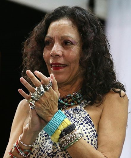 Compañera Rosario Murillo Vicepresidenta República De Nicaragua